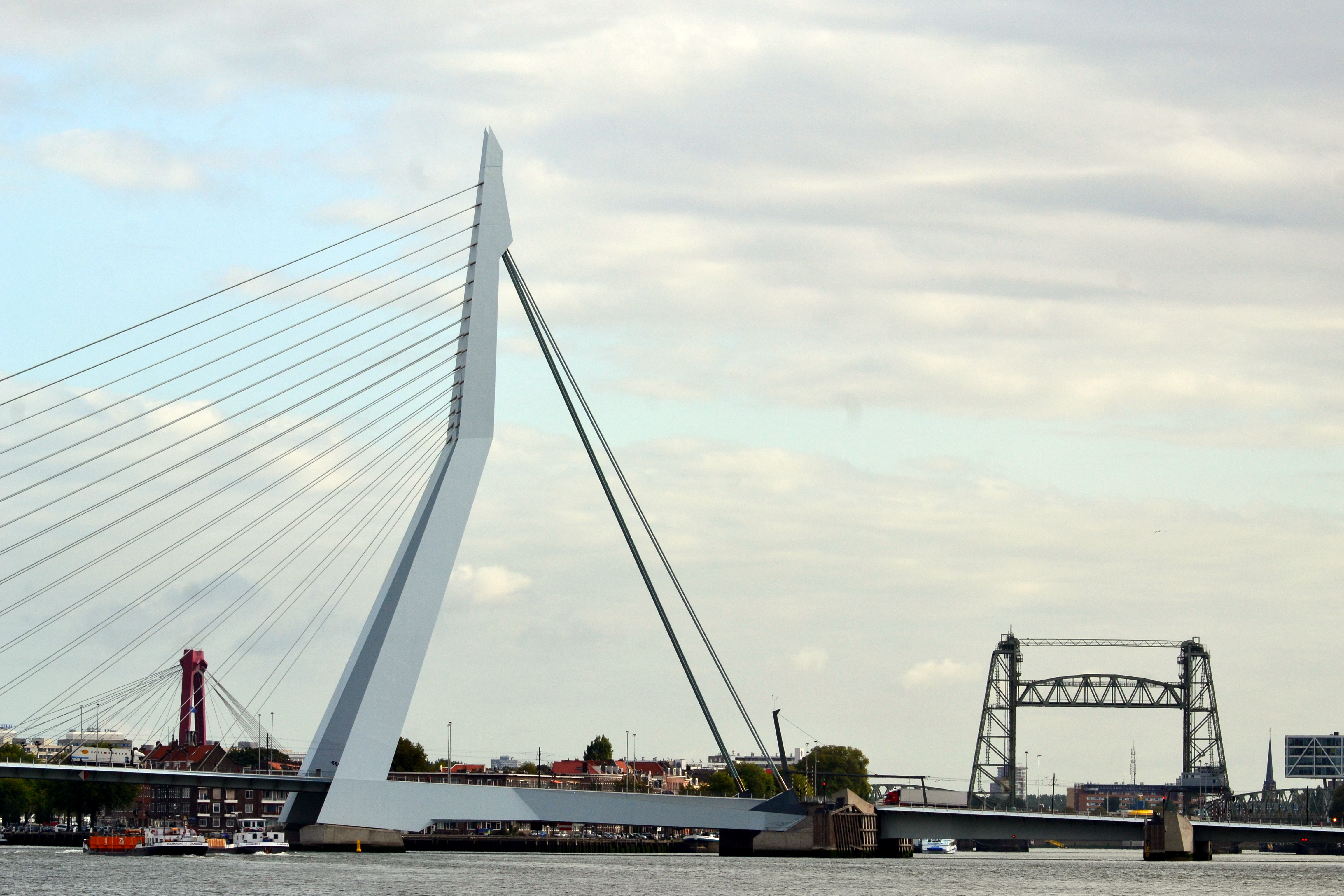 Deze foto is gemaakt tijdens een verblijf op de SS Rotterdam. This picture was taken during a stay on the SS Rotterdam.